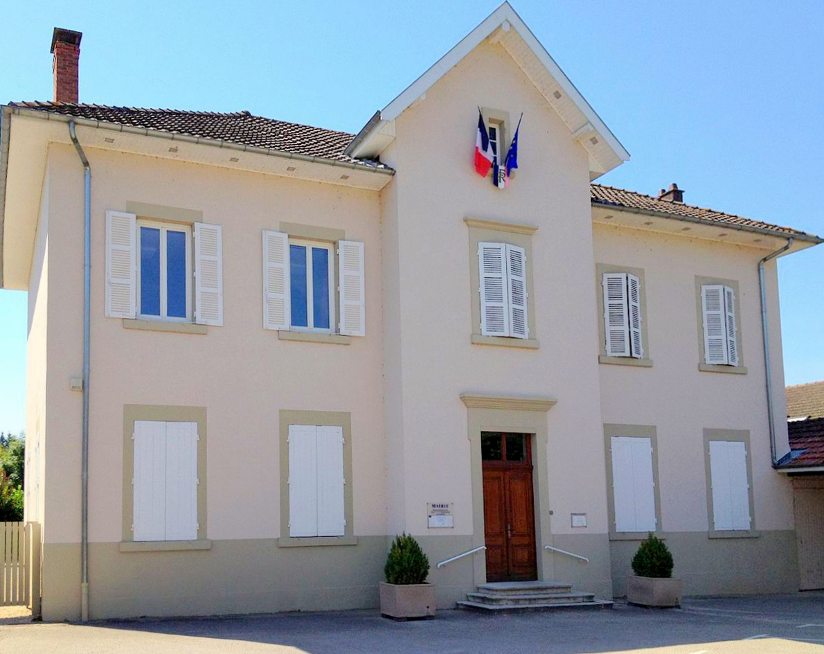 Mairie de Saint-Jean-de-Niost.